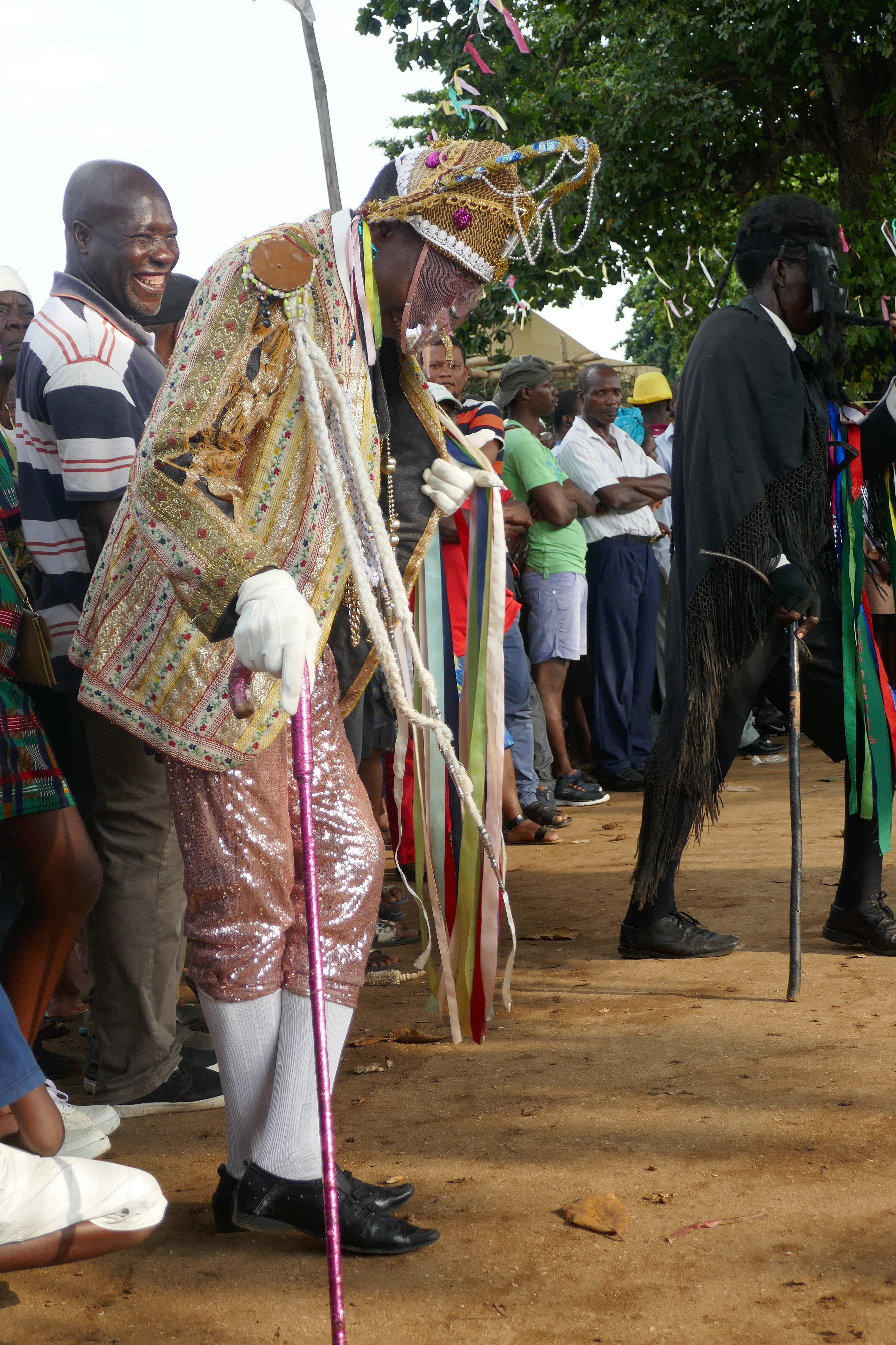 Tchiloli représenté devant l'église São Pedrão de São Tomé à l'occasion de la fête patronale. Le tchiloli est une forme théâtrale, musicale et dansée créée au XVIe siècle, jouée par des pêcheurs et des paysans. Traditionnellement elle met en scène la seule pièce du répertoire, La tragédie du marquis de Mantoue et de l'empereur Charlemagne". This is an image with the theme "Play" from: Sao Tome and Principe